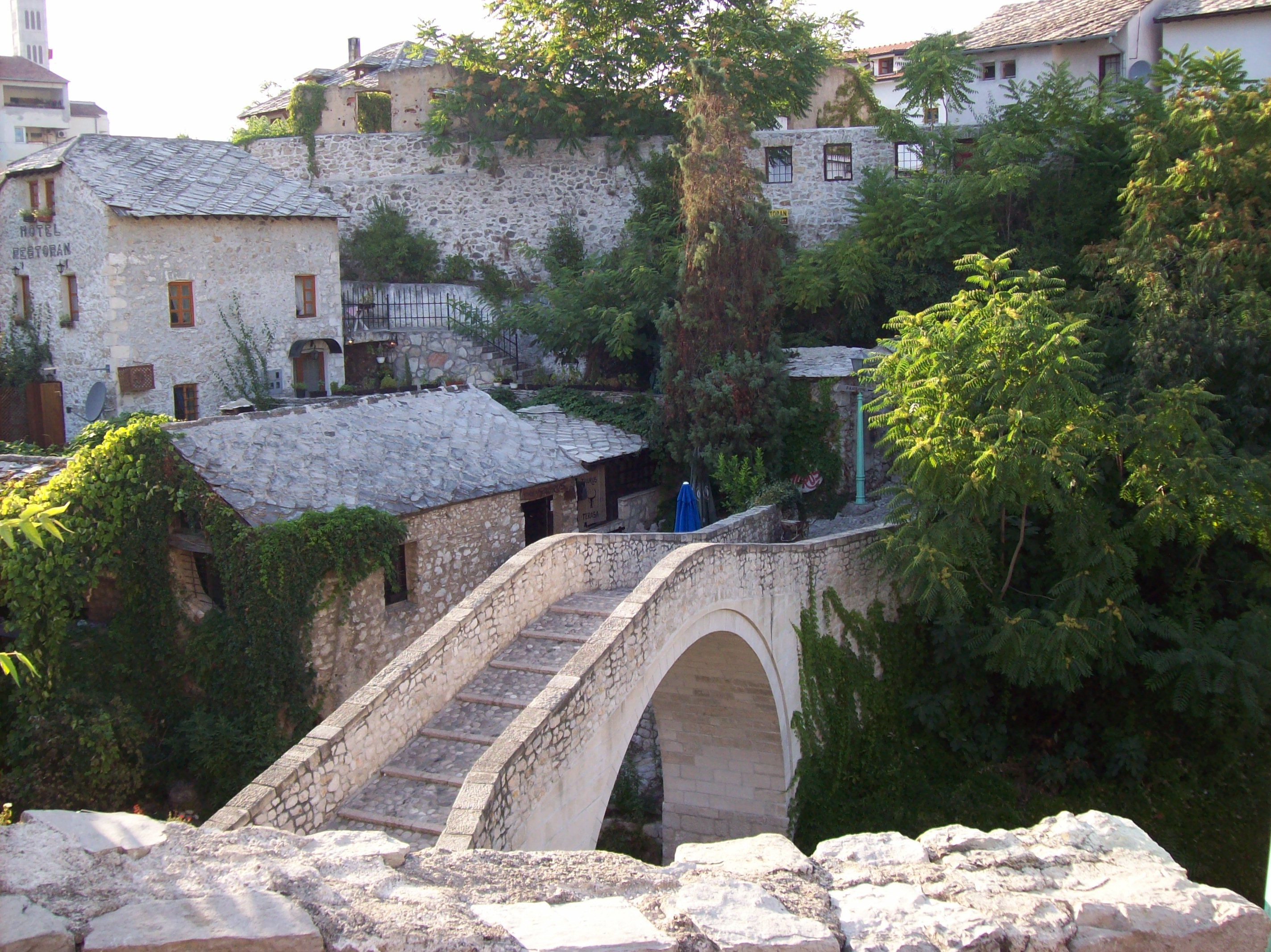 Ponte Storto di Mostar, in Bosnia.